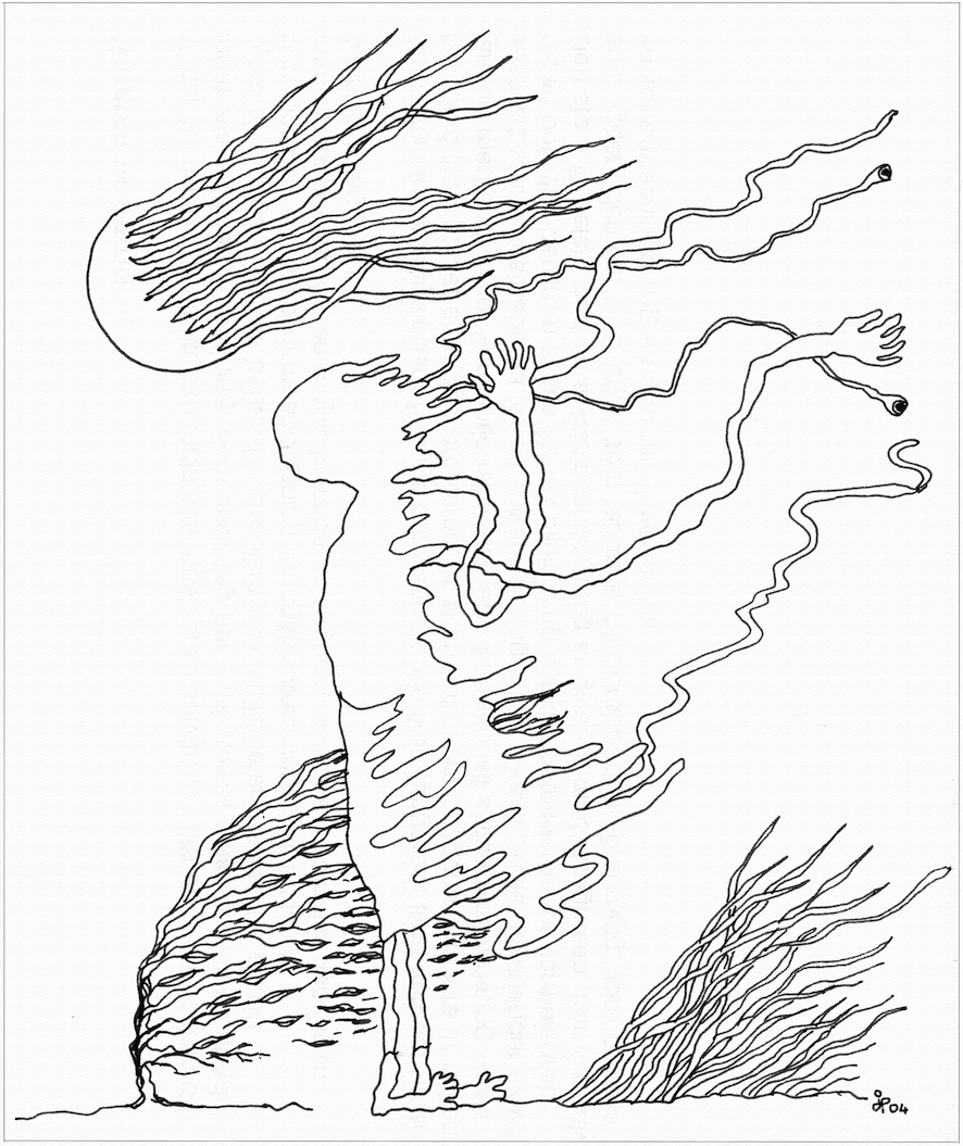 West wind (c) J Pyrko